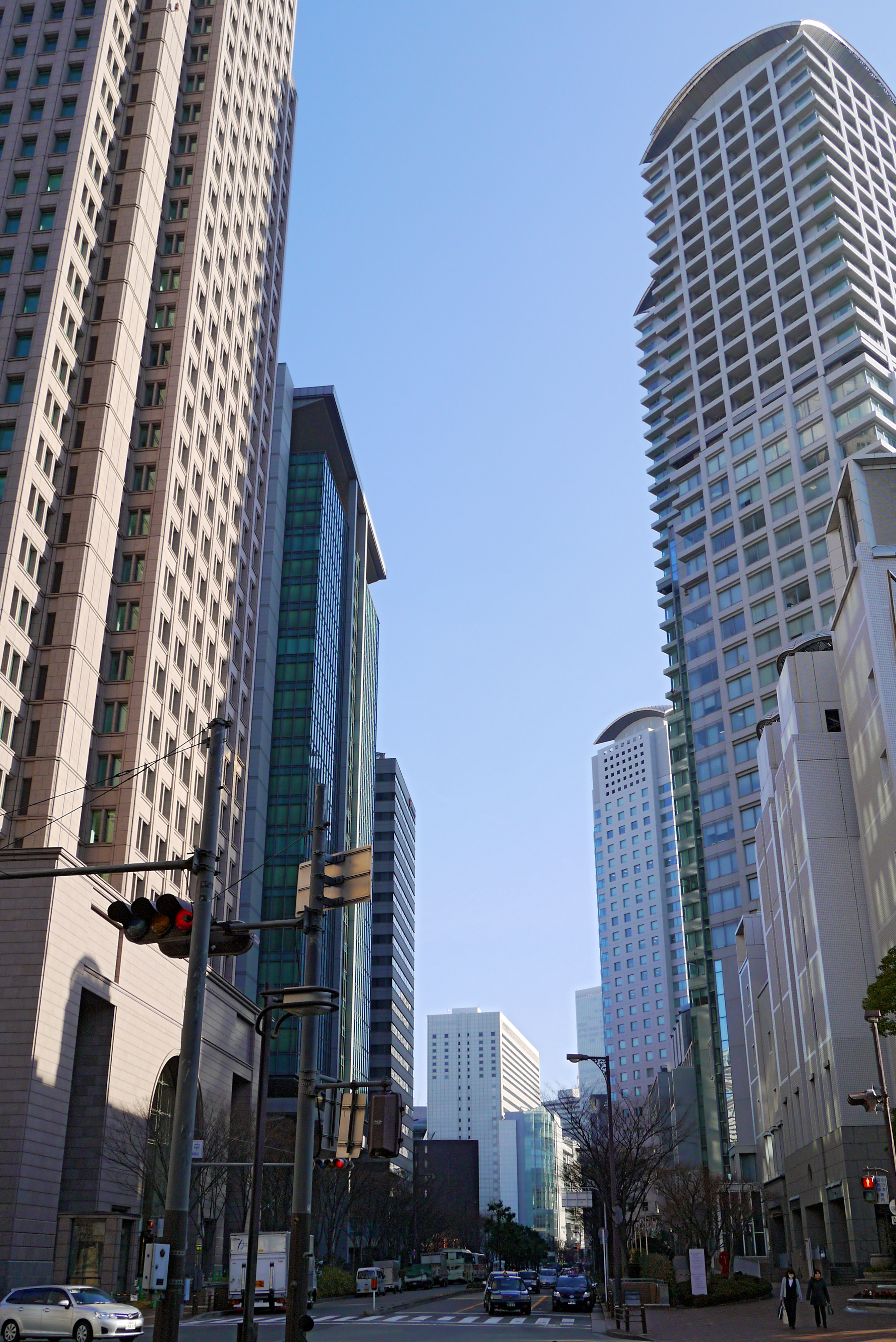 Osaka Garden City (オオサカガーデンシティ), Osaka, Osaka prefecture, Japan